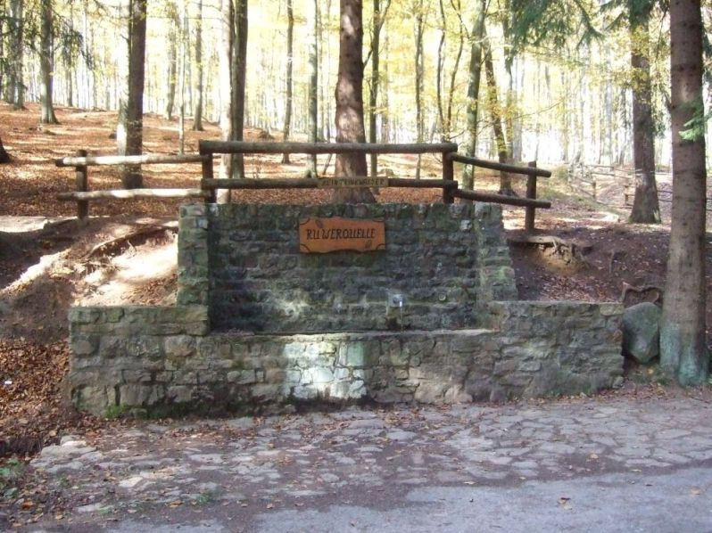 Ruwerquelle